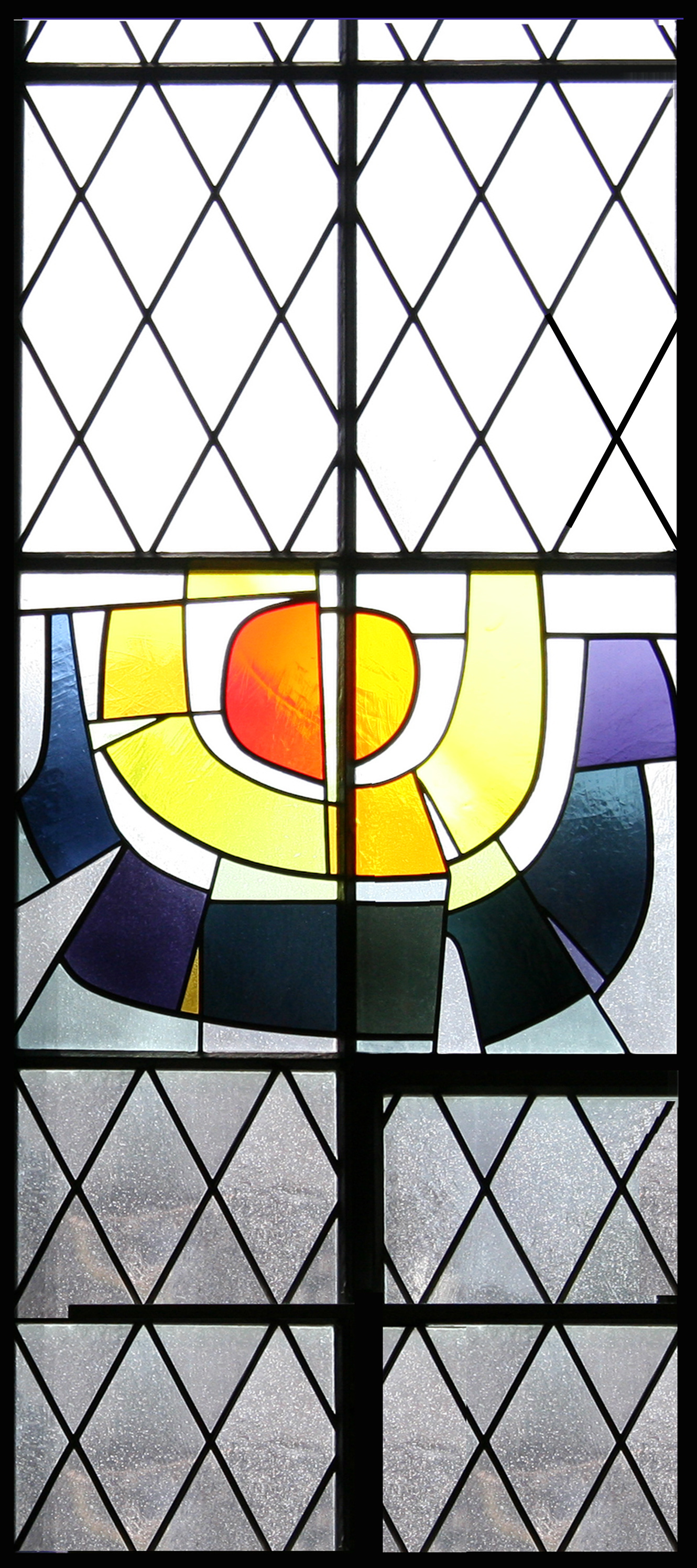 Römisch-katholische Pfarrkirche St. Antonius Kollbrunn: Glasmalerei von Heinrich Stäubli mit einem Thema aus der Genesis: Gott schied das Licht von der Finsternis.